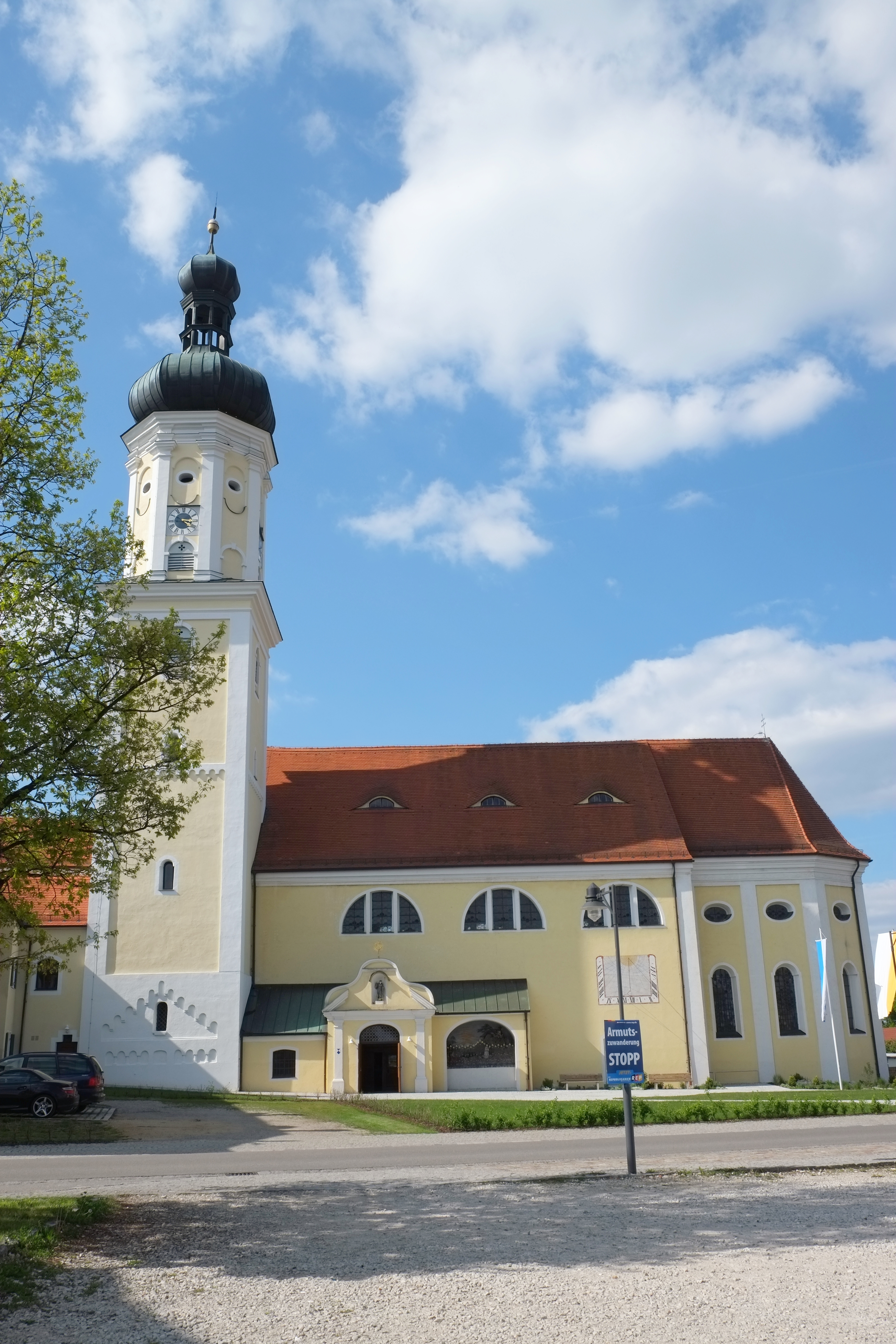 Kirche St. Magnus in Kühbach im Landkreis Aichach-Friedberg (Bayern, Deutschland)